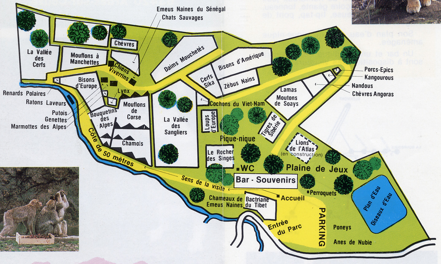 Plan Parc Animalier d'Auvergne 1990